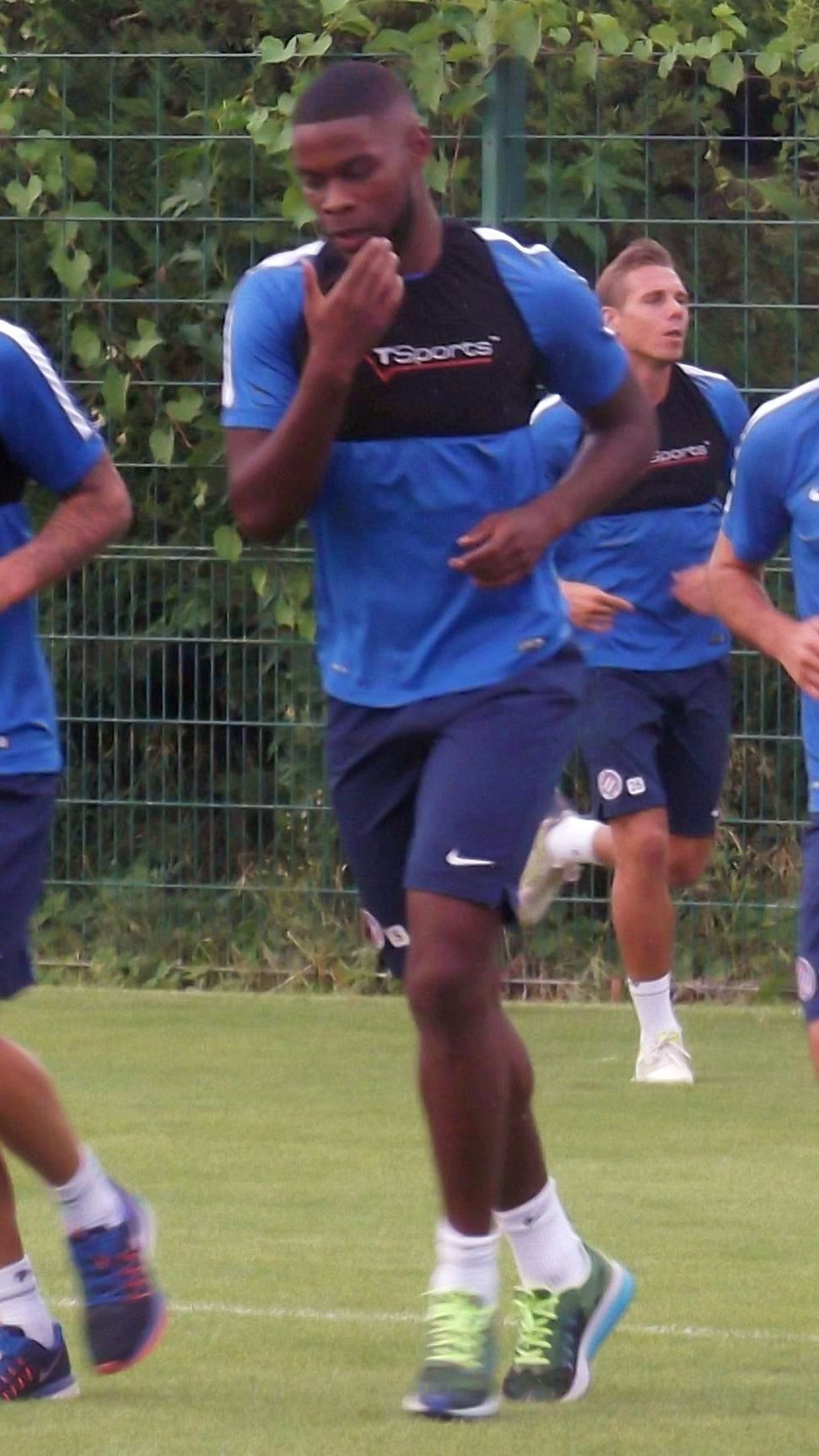 William Rémy (Montpellier), juillet 2015.